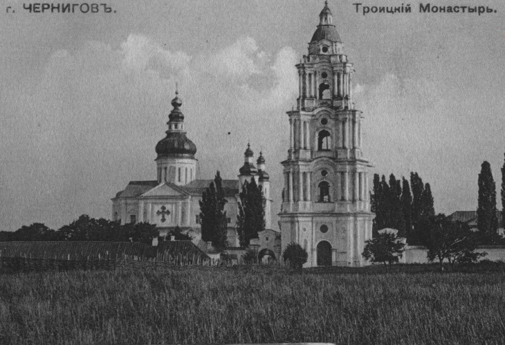 Троїцький собор в Чернігові.: Дореволюційне фото. Внаслідок численних перебудов собор втратив чотири бічні бані та весь бароковий декор. В 1980-1990-і рр. його реконструювали у гіпотетичних первісних формах.